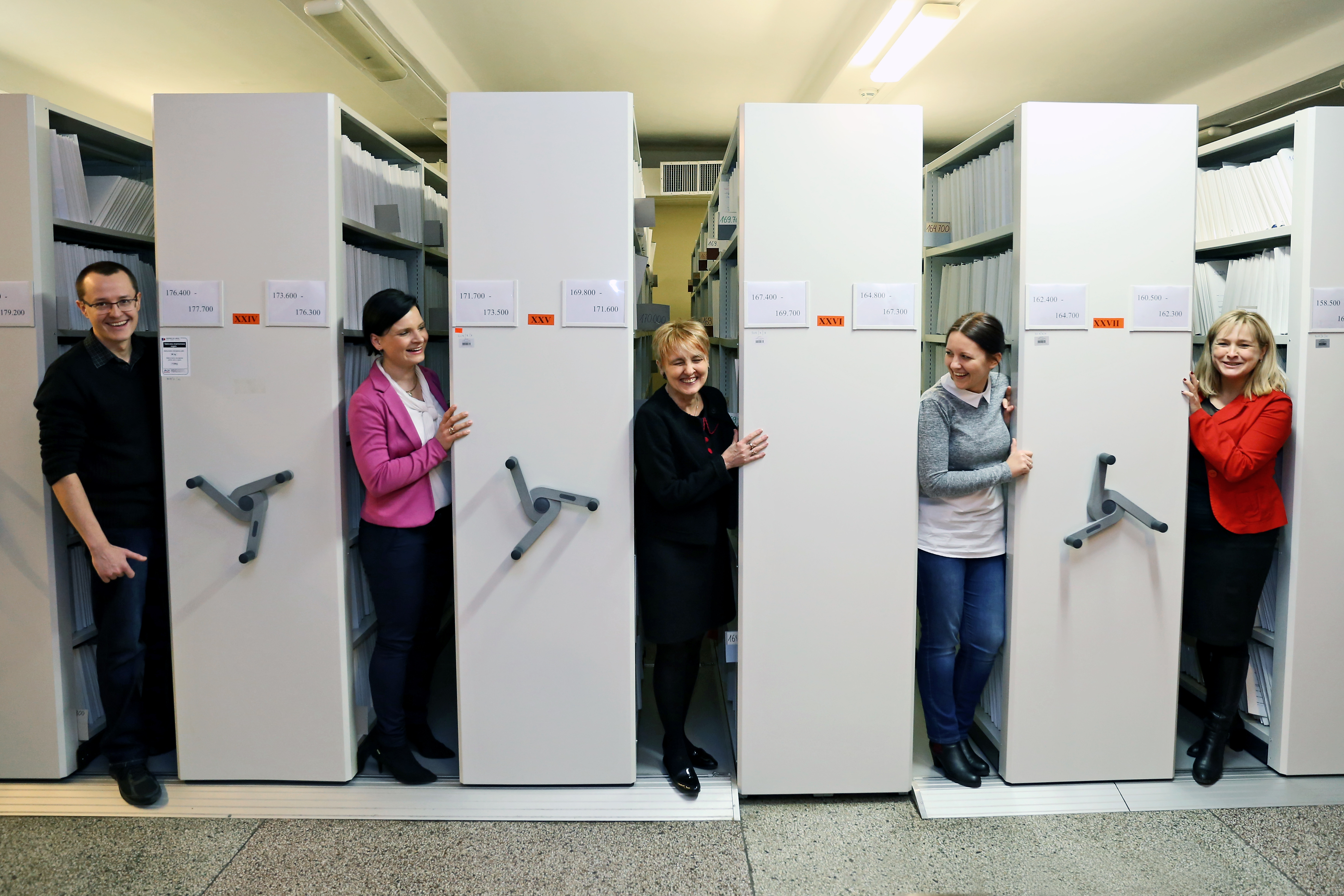 fot. Andrzej Romański